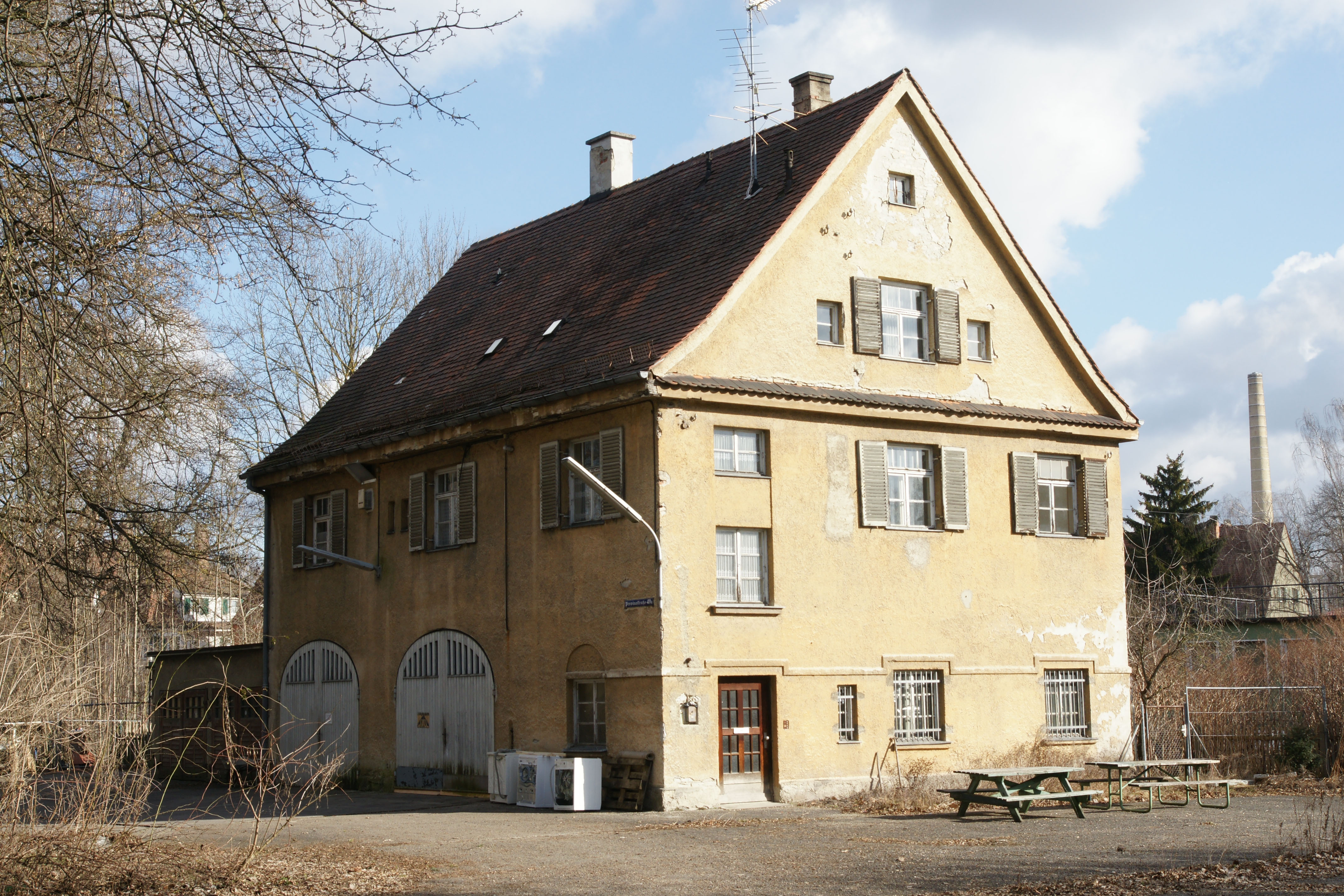 Garagenhaus der Augsburger Kammgarnspinnerei